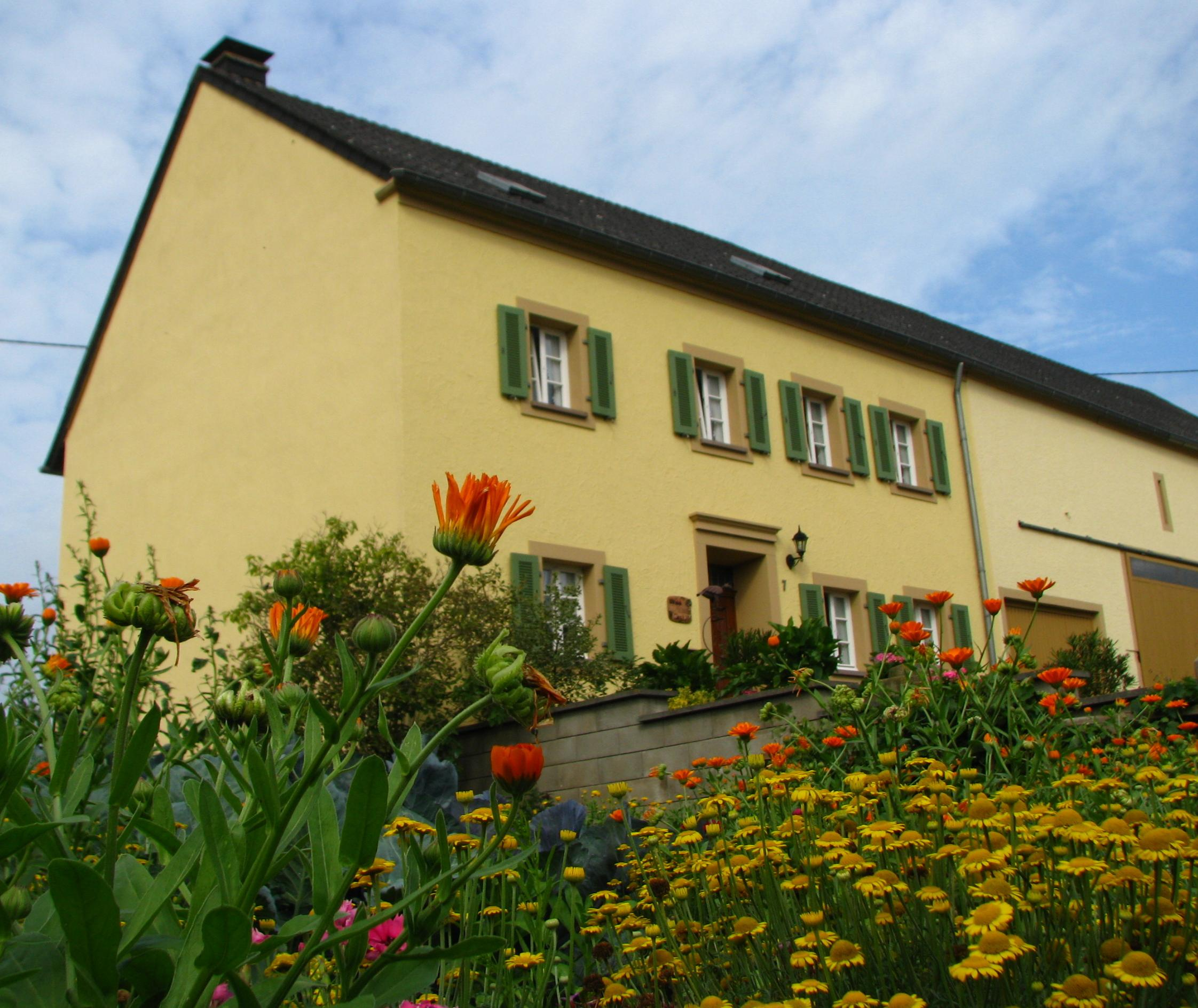 Bauernhaus in Eisenach (Eifel) mit Bauerngarten.